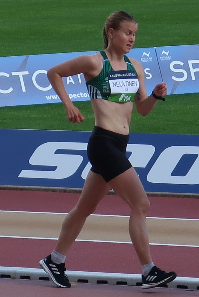 Elisa Neuvonen 10 000 metrin kävelyssä Paavo Nurmen stadionilla Turussa vuoden 2020 Kalevan kisojen avauspäivänä.